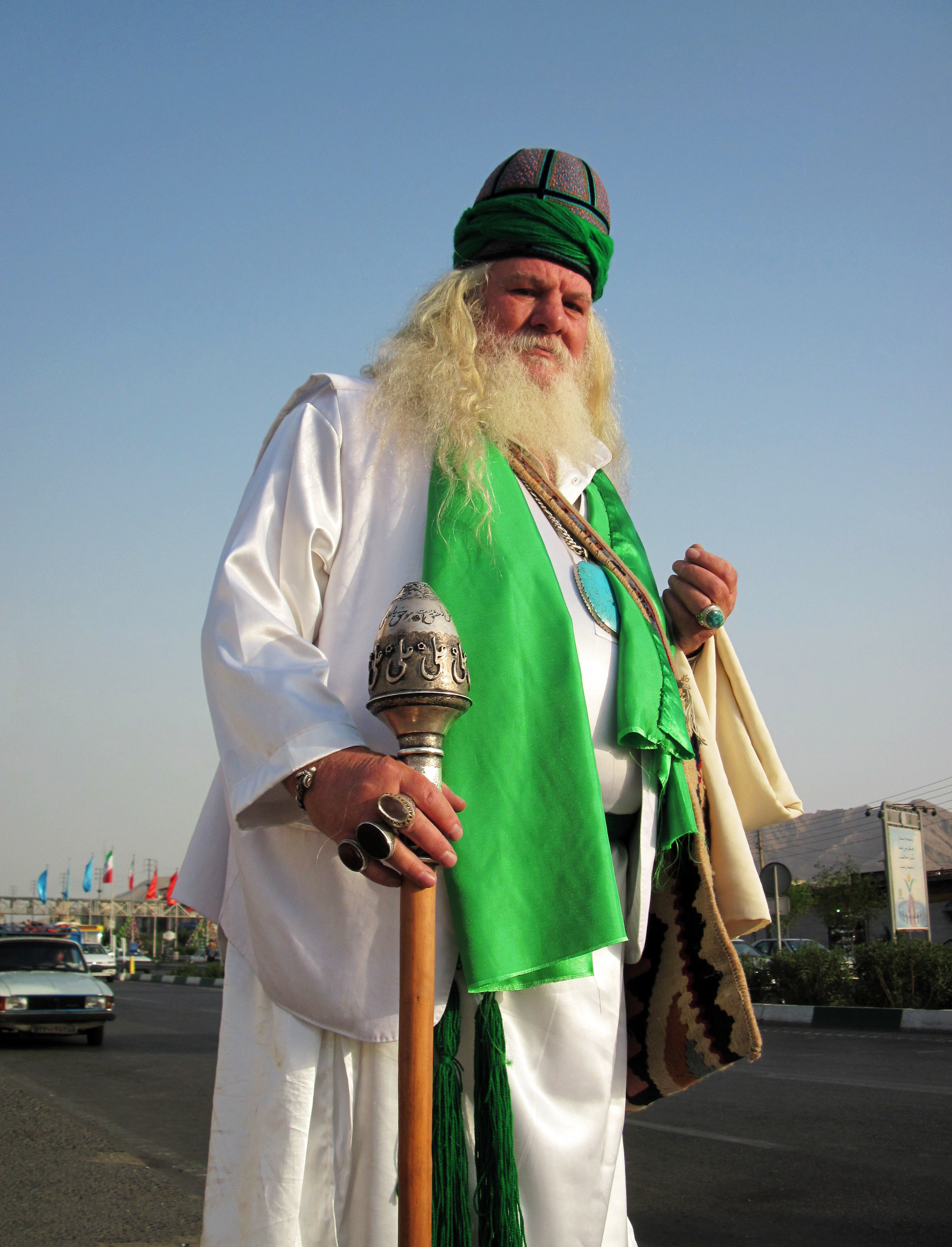 یک درویش در شهر تهران.